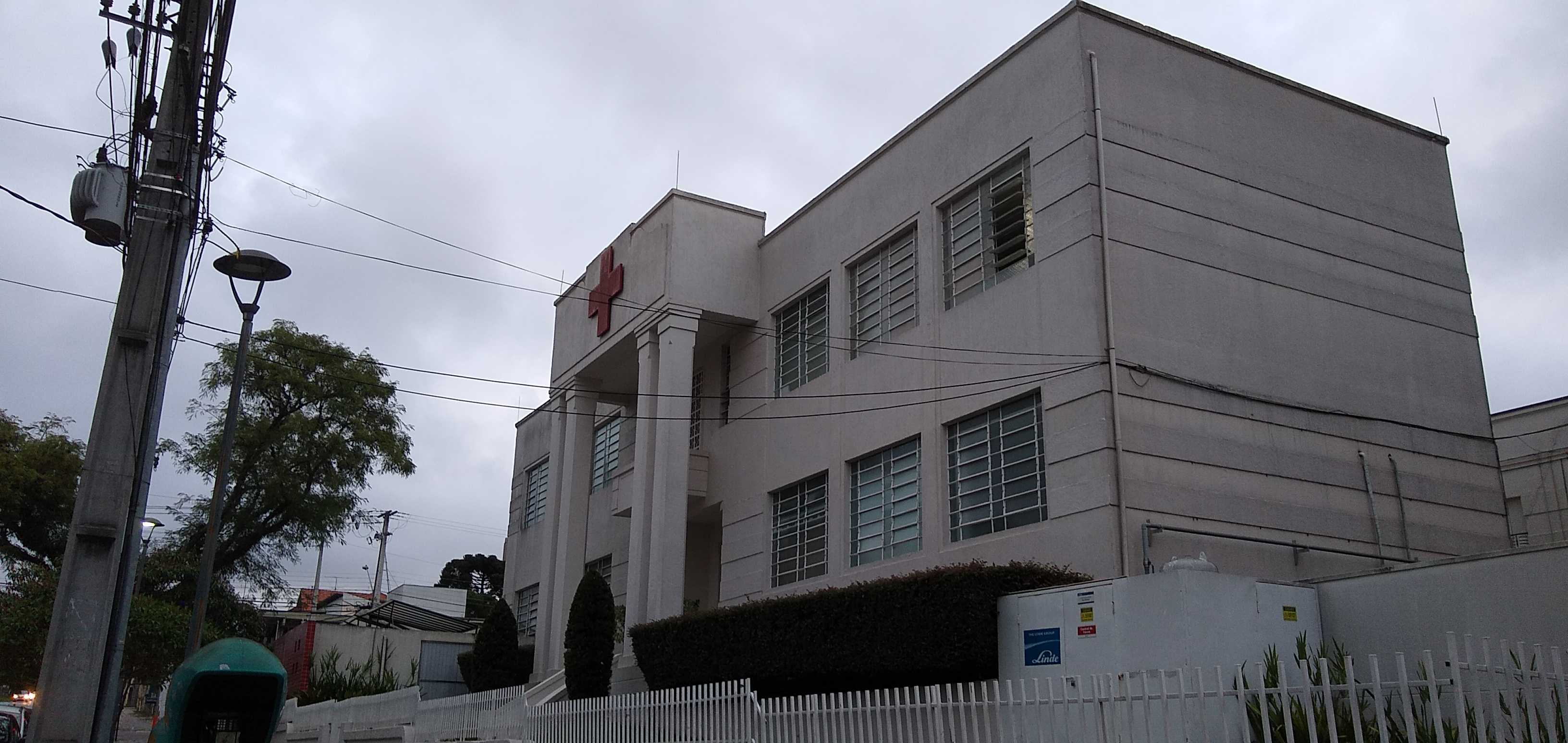 Fachada do primeiro prédio do complexo do Hospital da Cruz Vermelha em Curitba